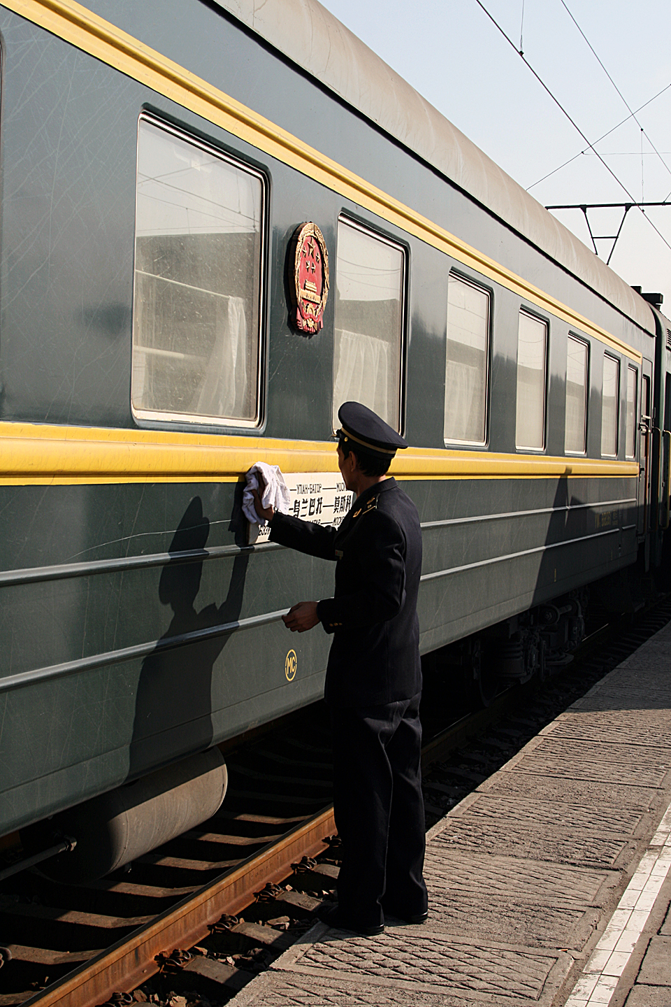 列车员正擦拭北京-乌兰巴托-莫斯科国际联运列车的水牌